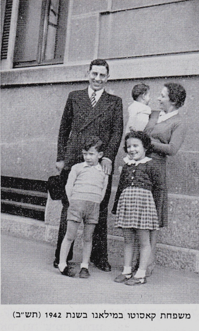 מילאנו- 1942